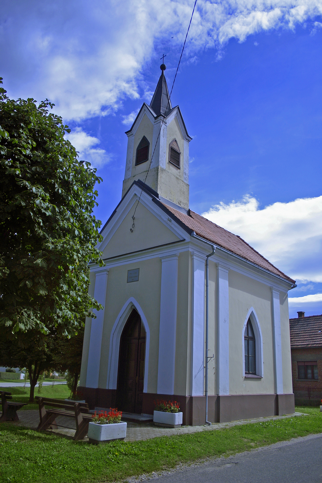 Kapela, Murski Črnci. Chapel, Murski Črnci. Kapelle, Murski Črnci.